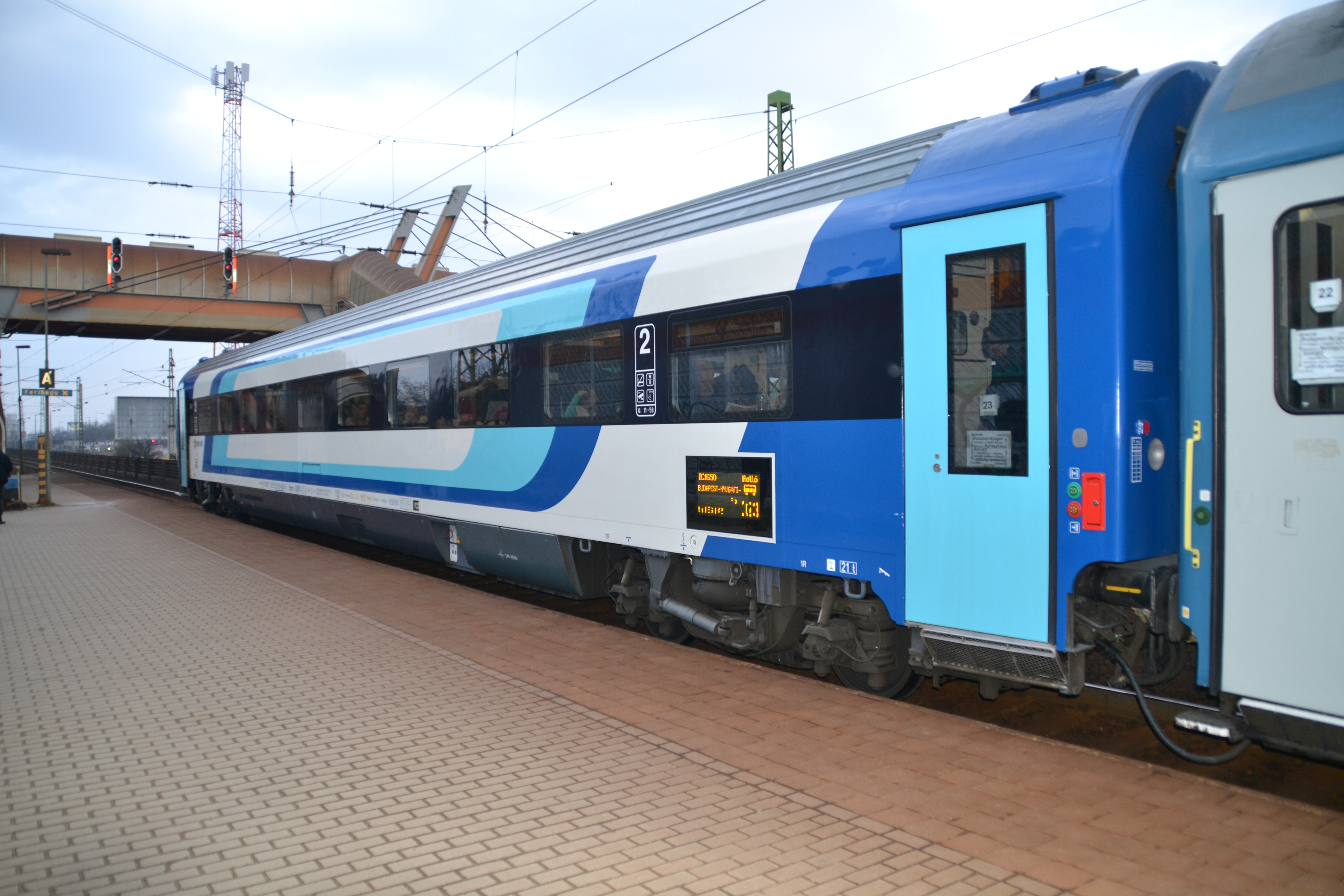 A MÁV IC+ személykocsija Ferihegy vasútállomáson